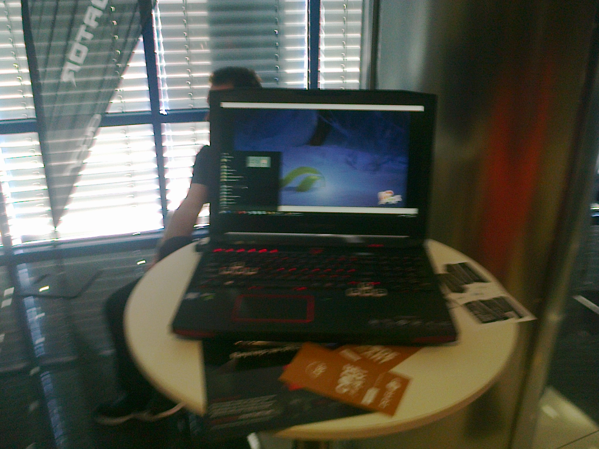 Acer Predator 15